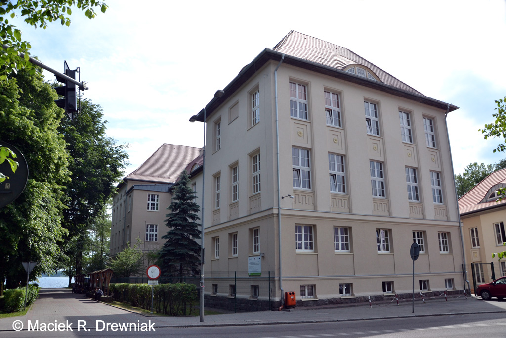 Szczecinek, ul. Księżnej Elżbiety 1 - I Liceum Ogólnokształcące im. Księżnej Elżbiety